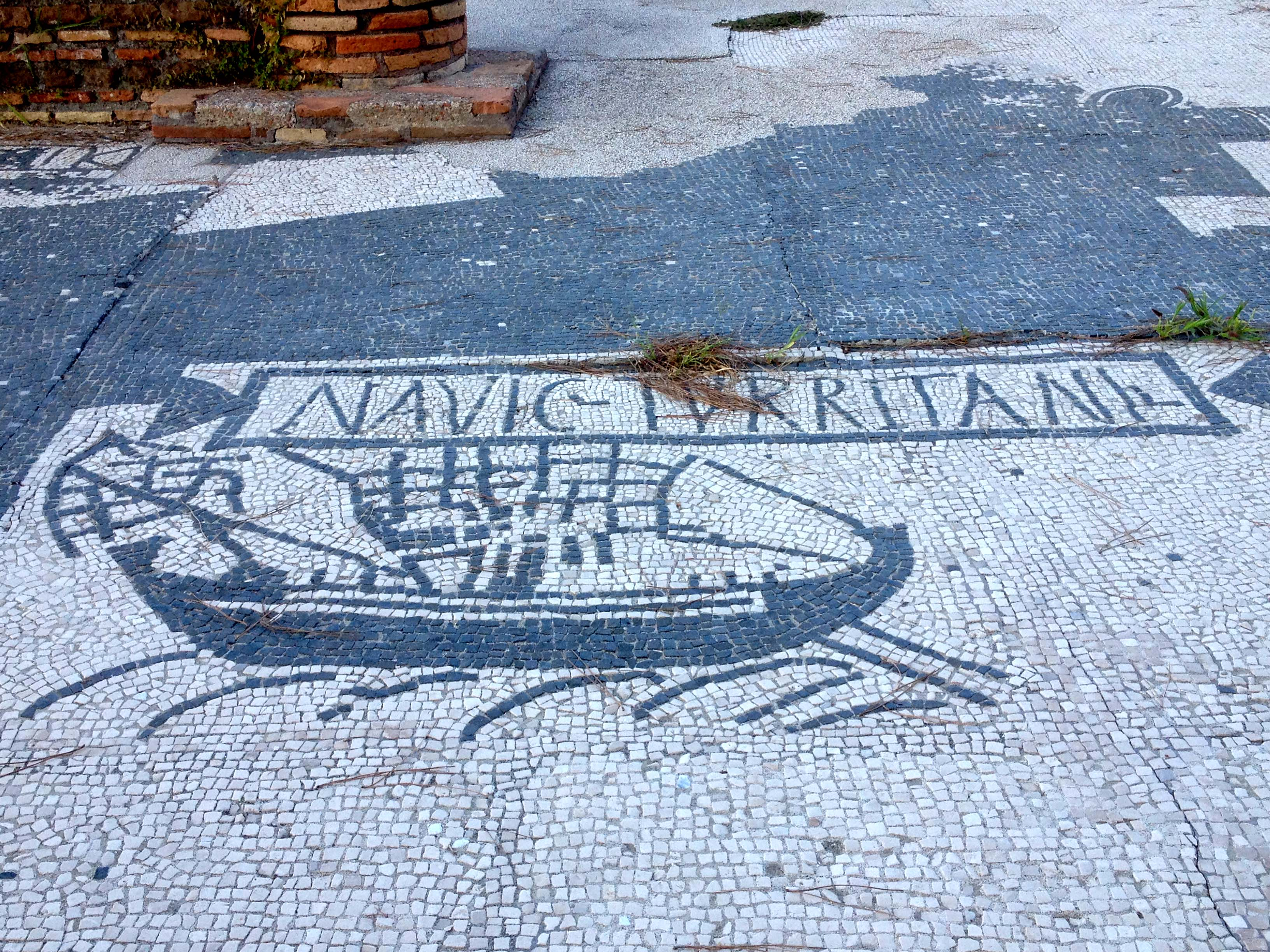 Ostia Antica, "piazzale delle corporazioni". Lo spazio commerciale dei Navicularii di Turris Libisonis (attuale Porto Torres, Sardegna) nel foro di Ostia Antica; mosaico pavimentale. Foto del 28 agosto 2016.